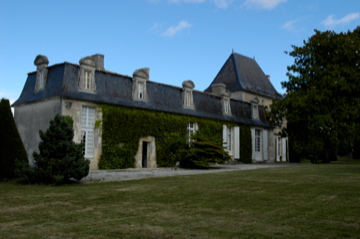 Vue d'ensemble